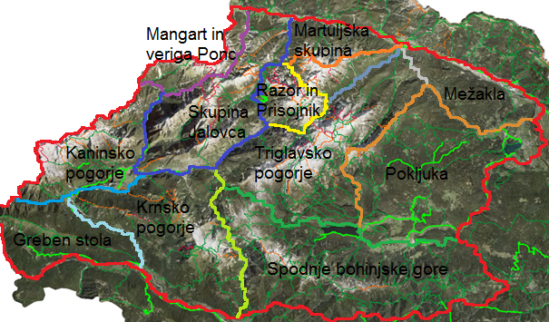 Gorske skupine v Julijskih Alpah